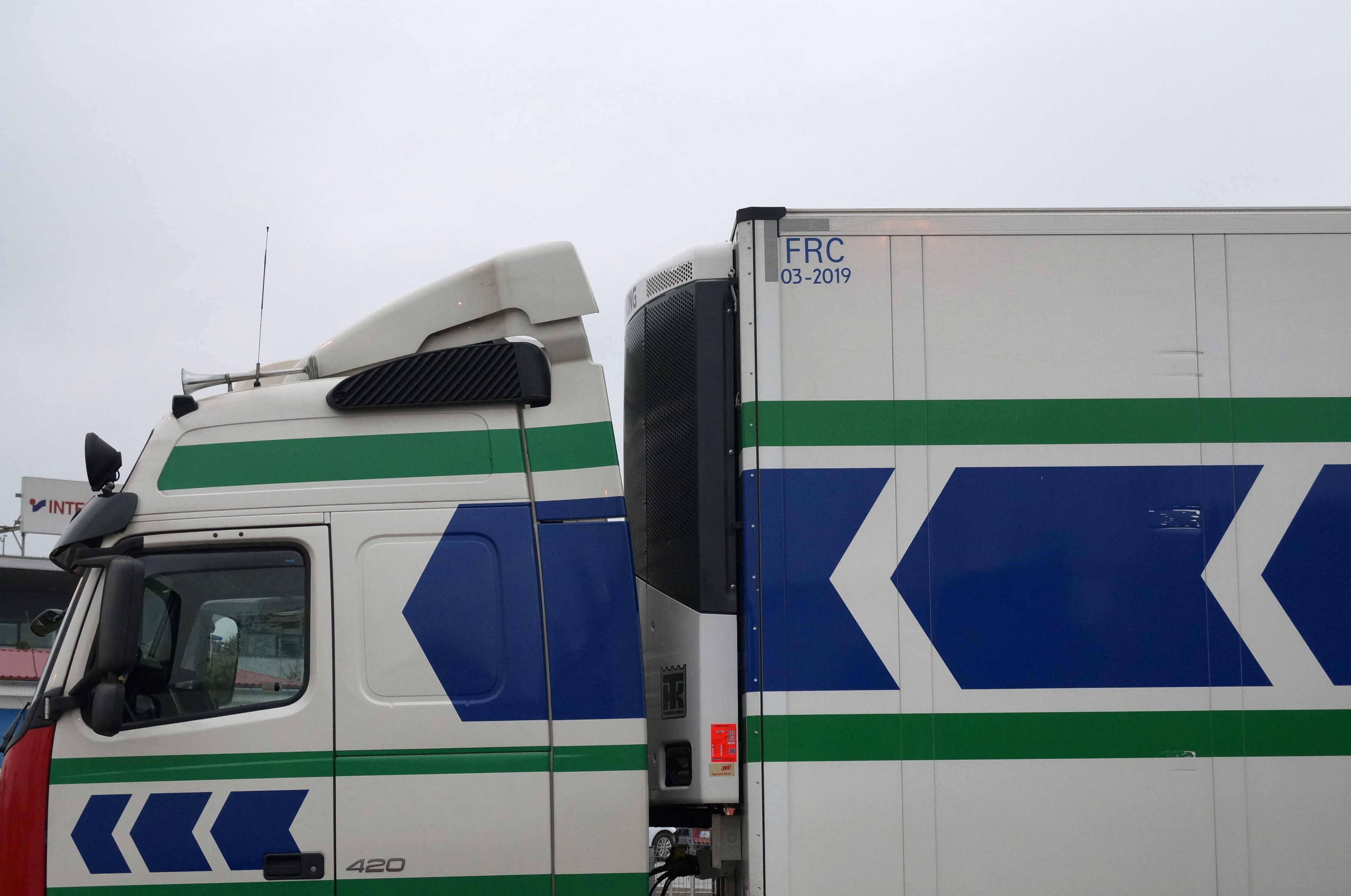 Certifikát FRC izotermického návěsu